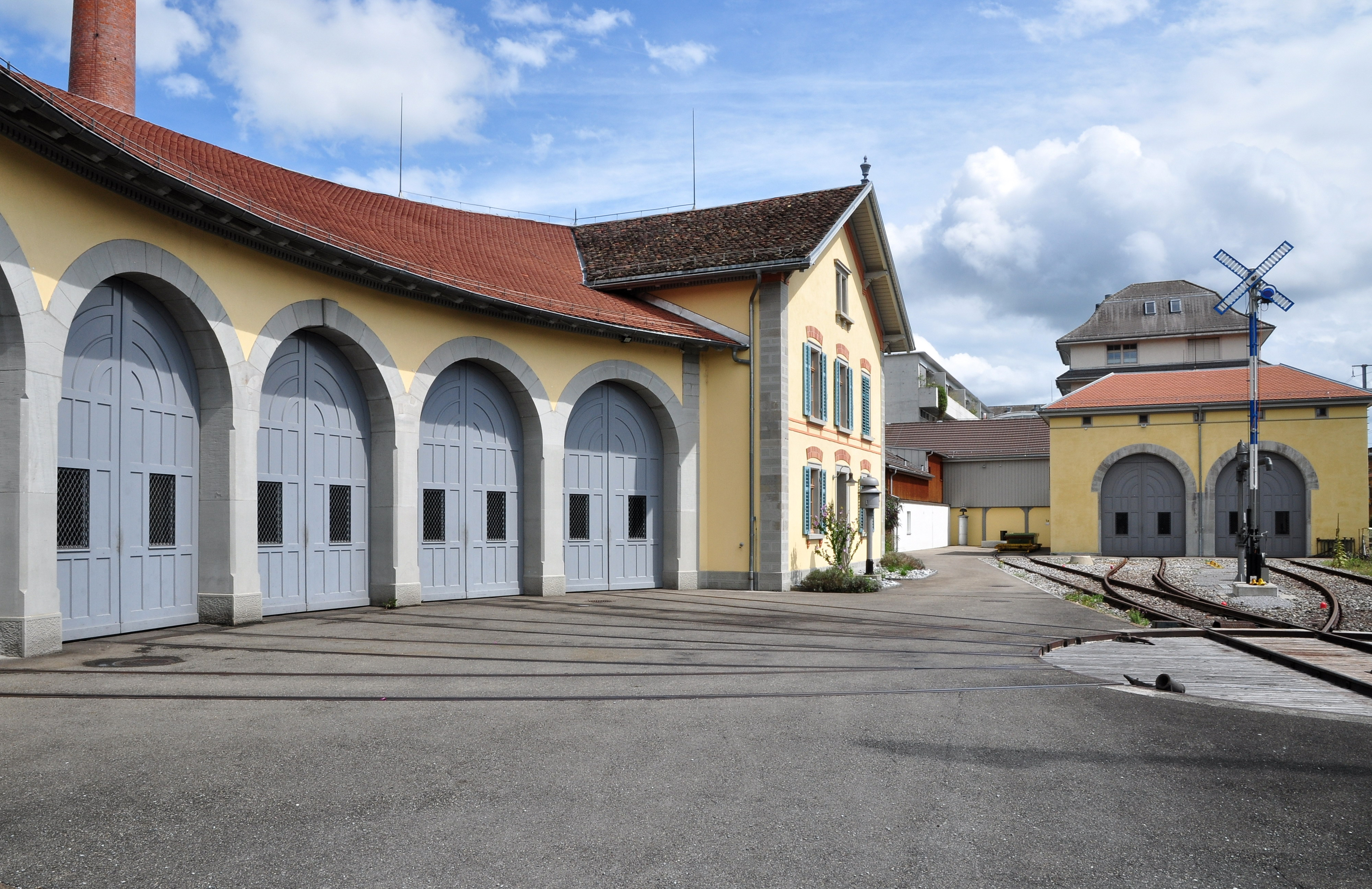 Bahnhof mit zwei Lok-Remisen in Uster (Switzerland)